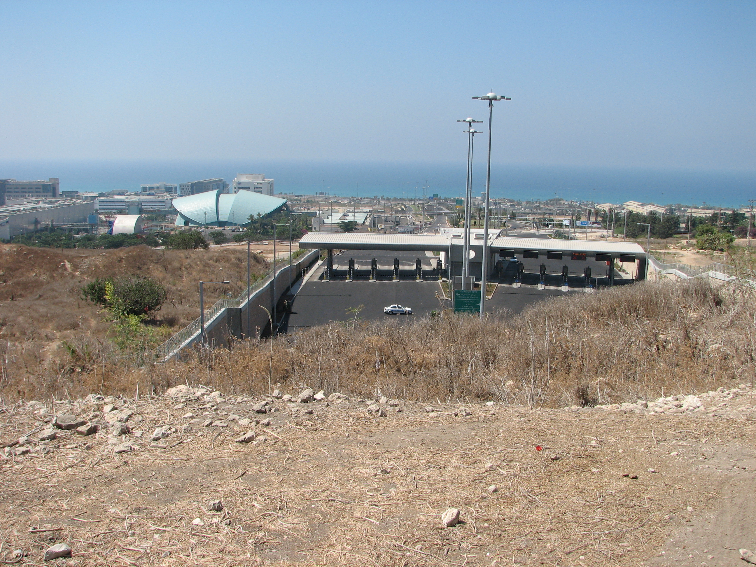 West entrance of Carmel Tunnels in Haifa, Israel. Cfar Samir entrance כניסה למערות הכרמל מצד מערב , מכפר סמיר. הכניסה נחצבה במקום בו שכנה בעבר העיר קסטרא